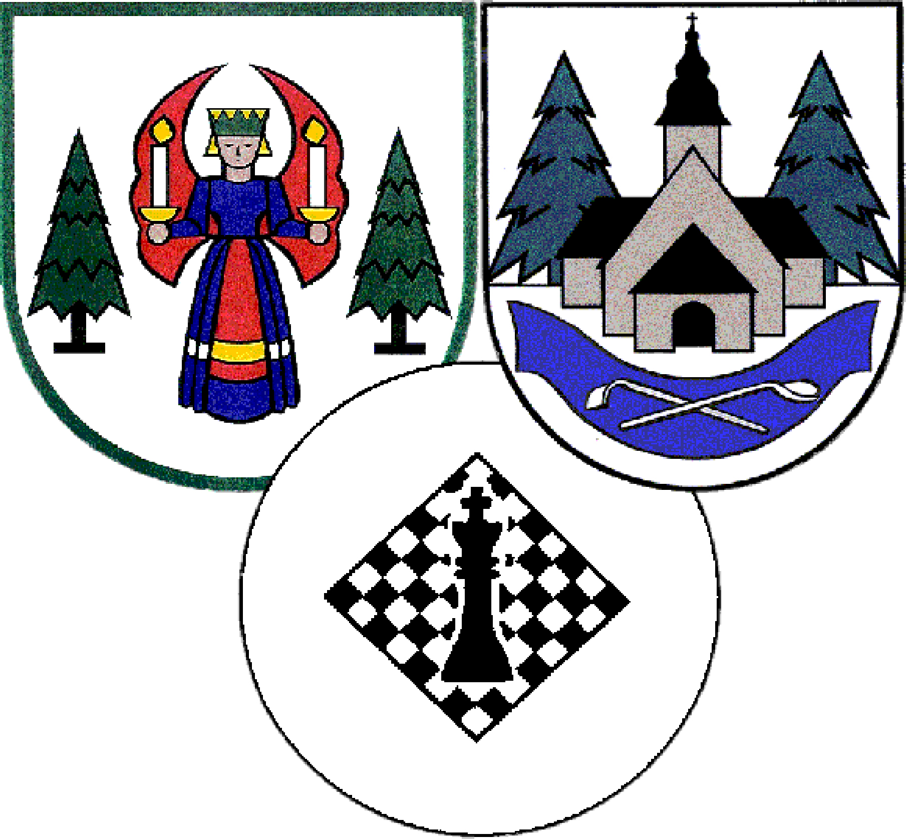 inoffizielles Wappen aus den Wappen der Ortsteile Grünhainichen (Engel), Waldkirchen (Kirche) und Borstendorf (Schachbrett)